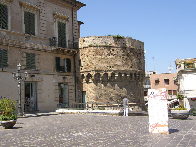 Vasto